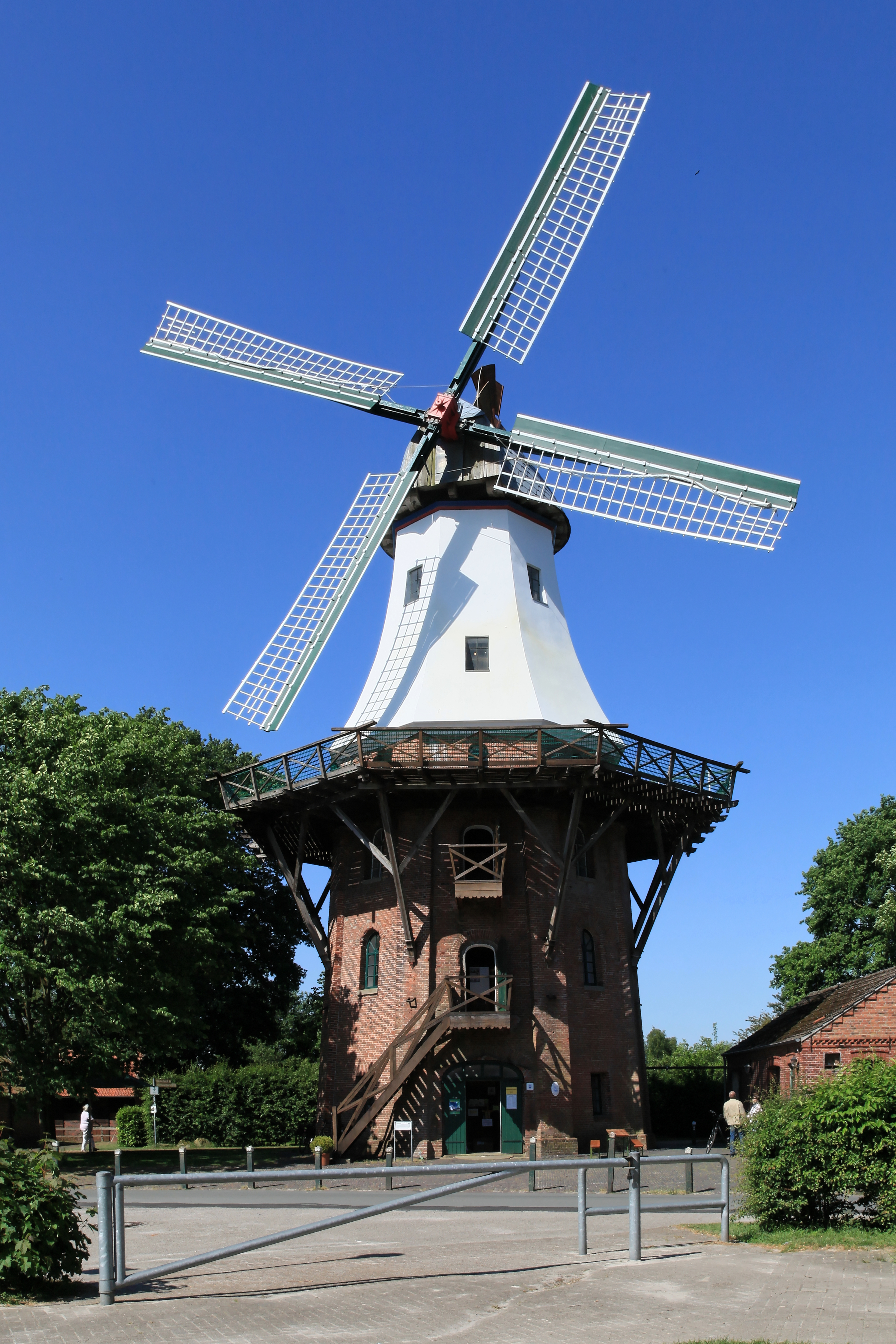 Ebkenssche Mühle, Mühlenweg in Barßel am Deutschen Mühlentag 2018